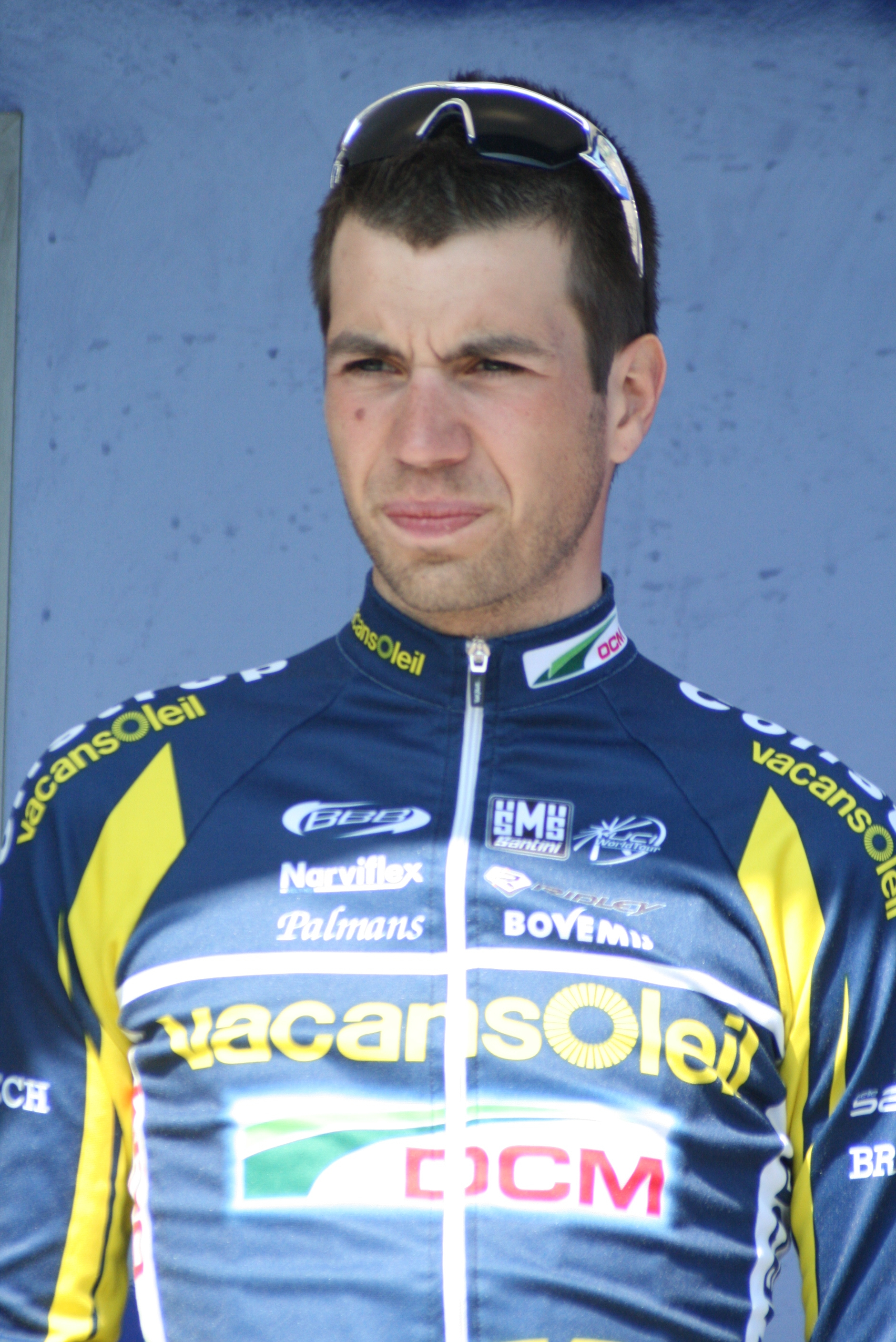 Présentation des coureurs au départ de la première étape Martijn Keizer